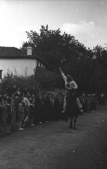 Antzara-jokoa Saran (Lapurdi)